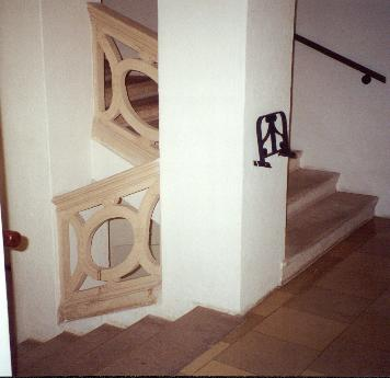 Wien, Herrengasse 23 (Palais Porcia), Stiege